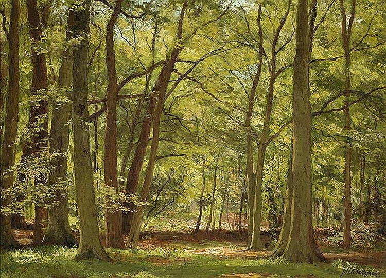 Bosgezicht